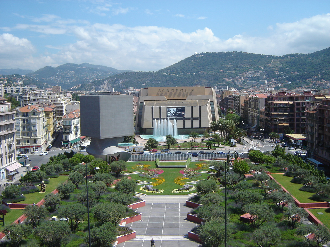 View of Nice, France. From the top of the Contemporary Arts Museum.